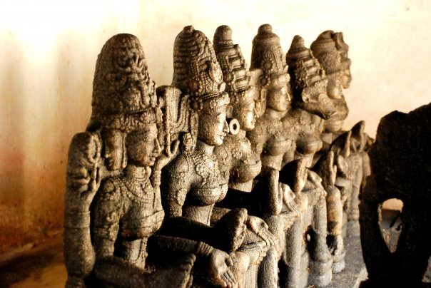 സപ്തമാതൃക്കൾ നിരണം ക്ഷേത്രം